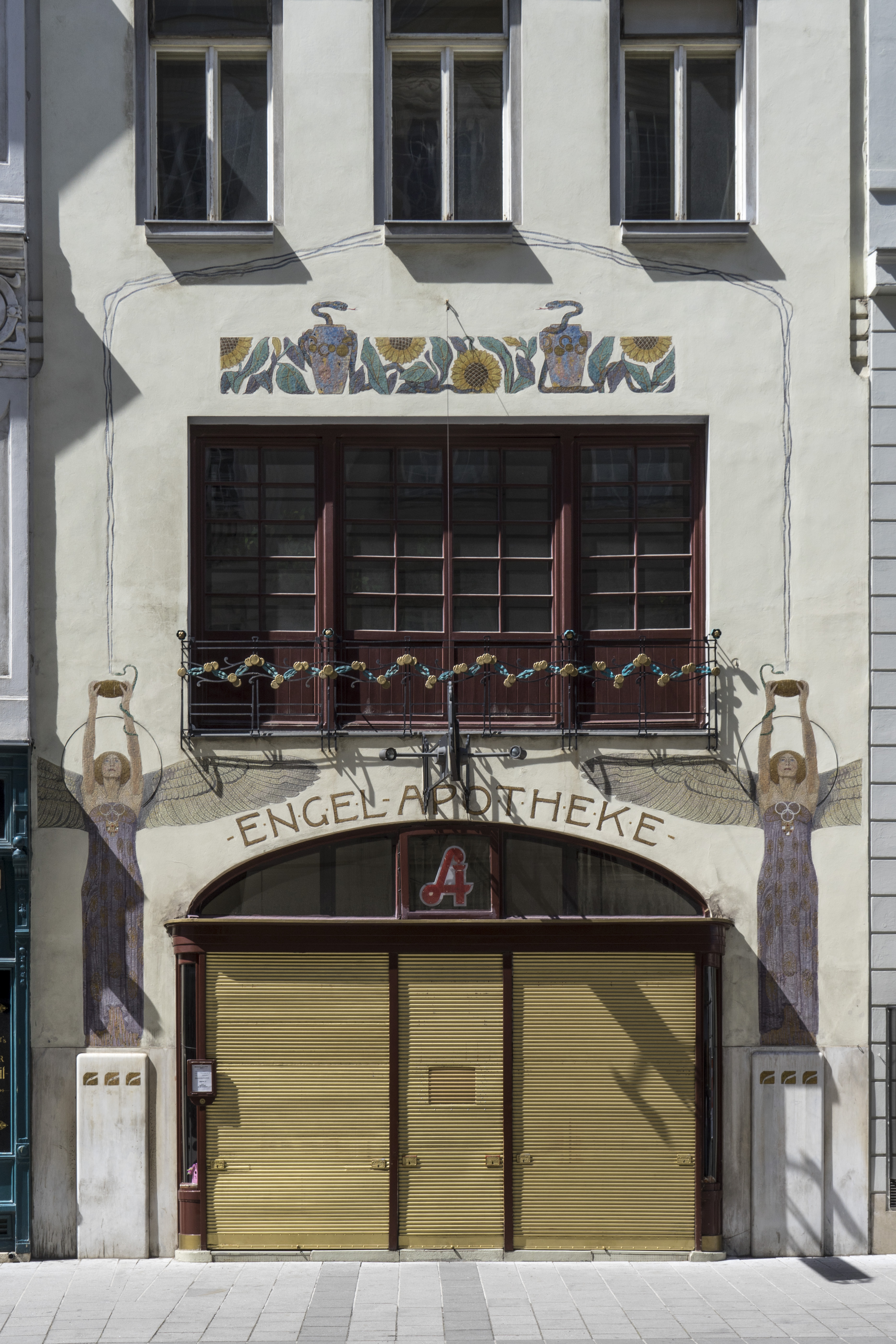 Apotheke zum weißen Engel, Vienna